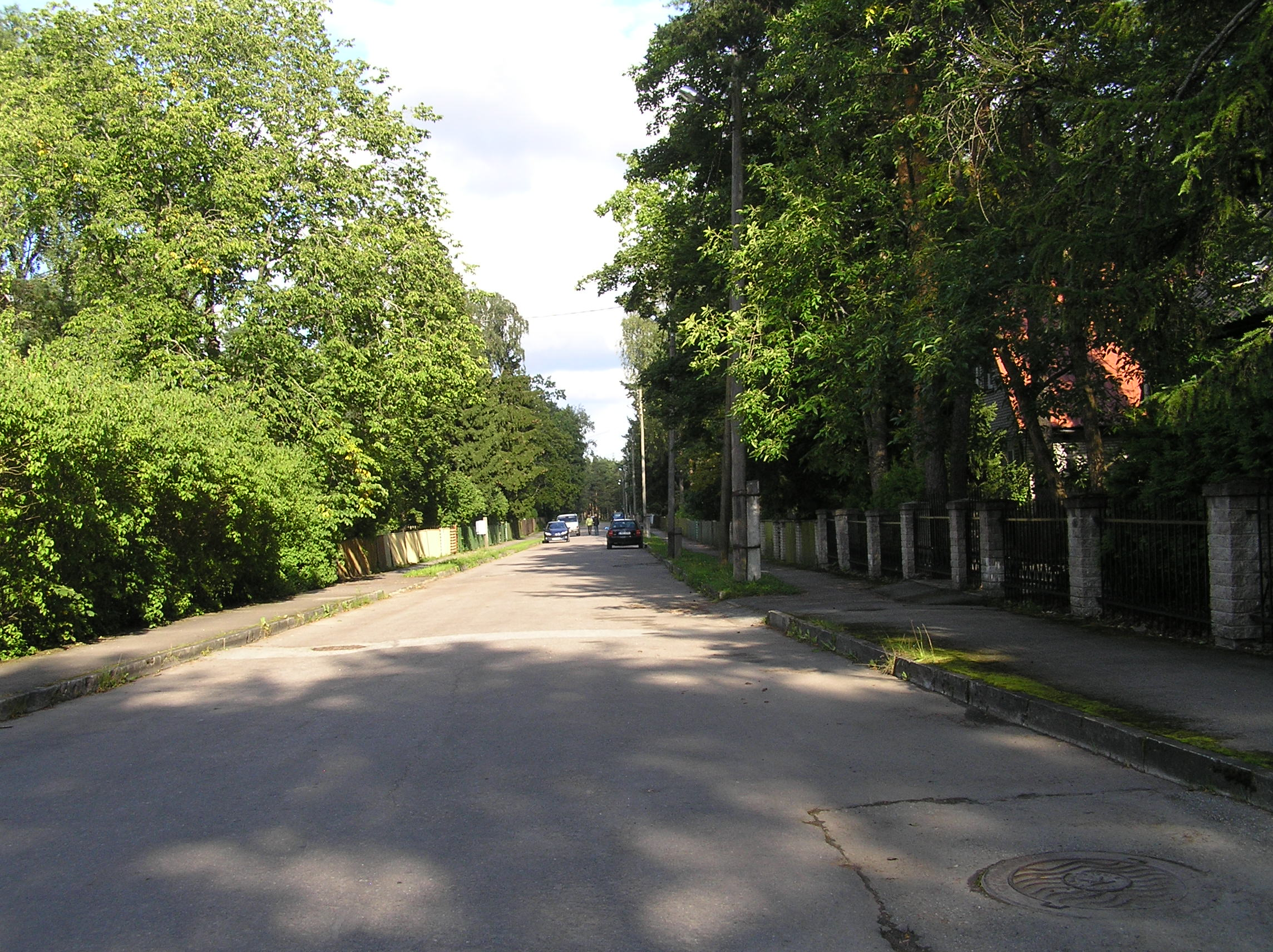 Paiste tänav